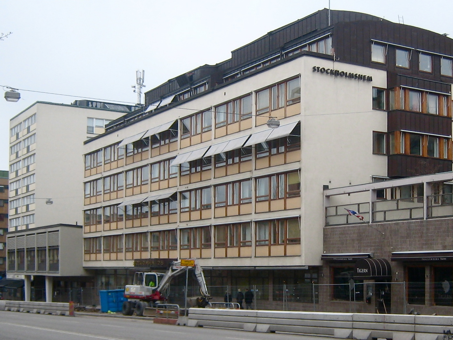 Stockholmshems huvudkontor.